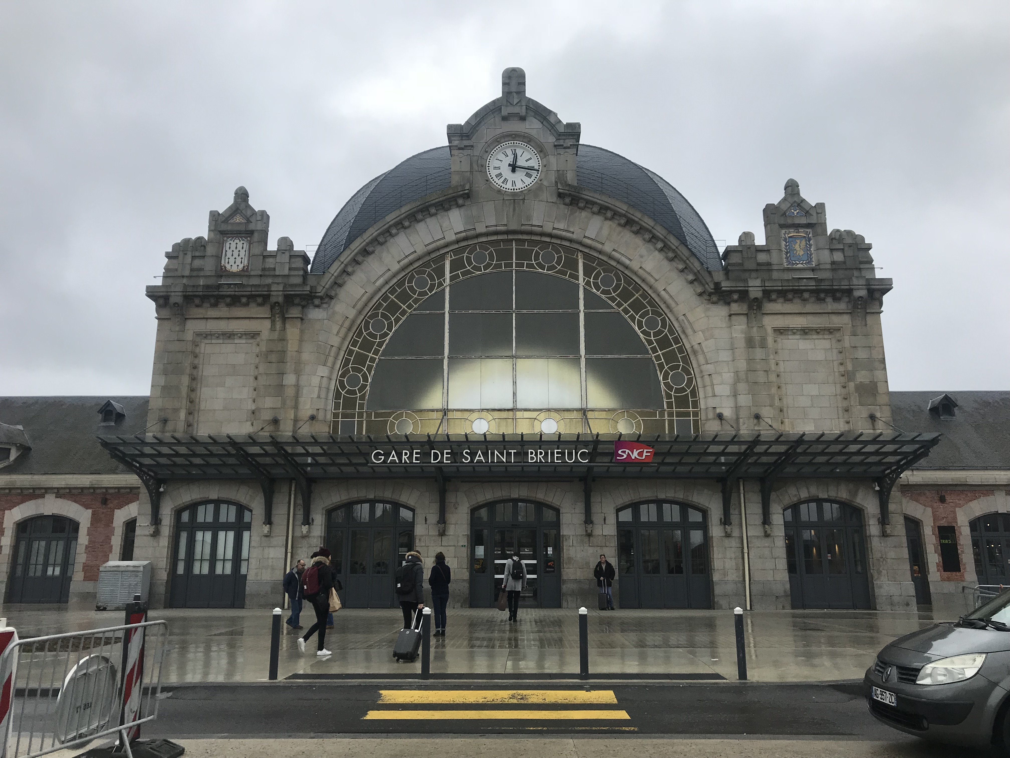 Gare de Saint-Brieuc en janvier 2019